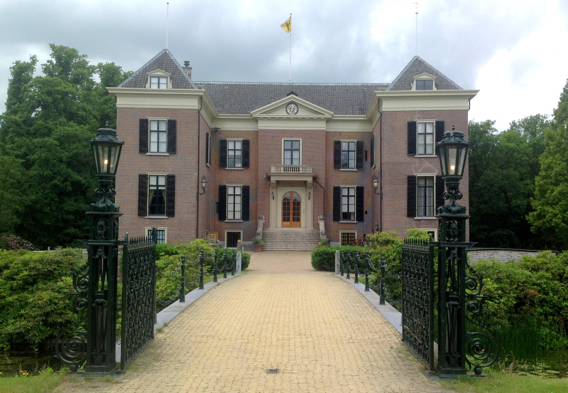 Huis Doorn, locatie van een "editathon" (schrijfmiddag) van Wikimedia Nederland.